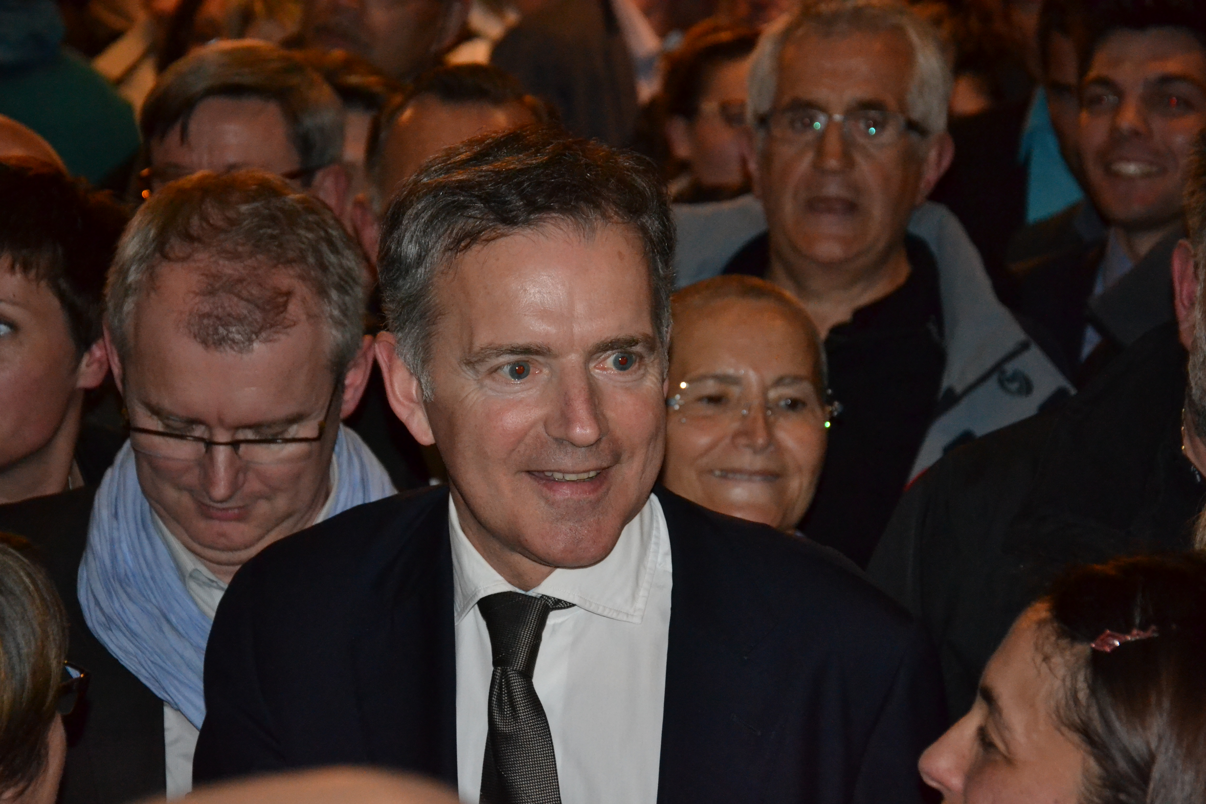 Soirée électorale de François Zocchetto